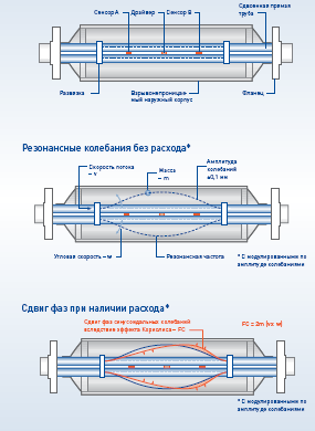 Схематическое изображение массового расходомера